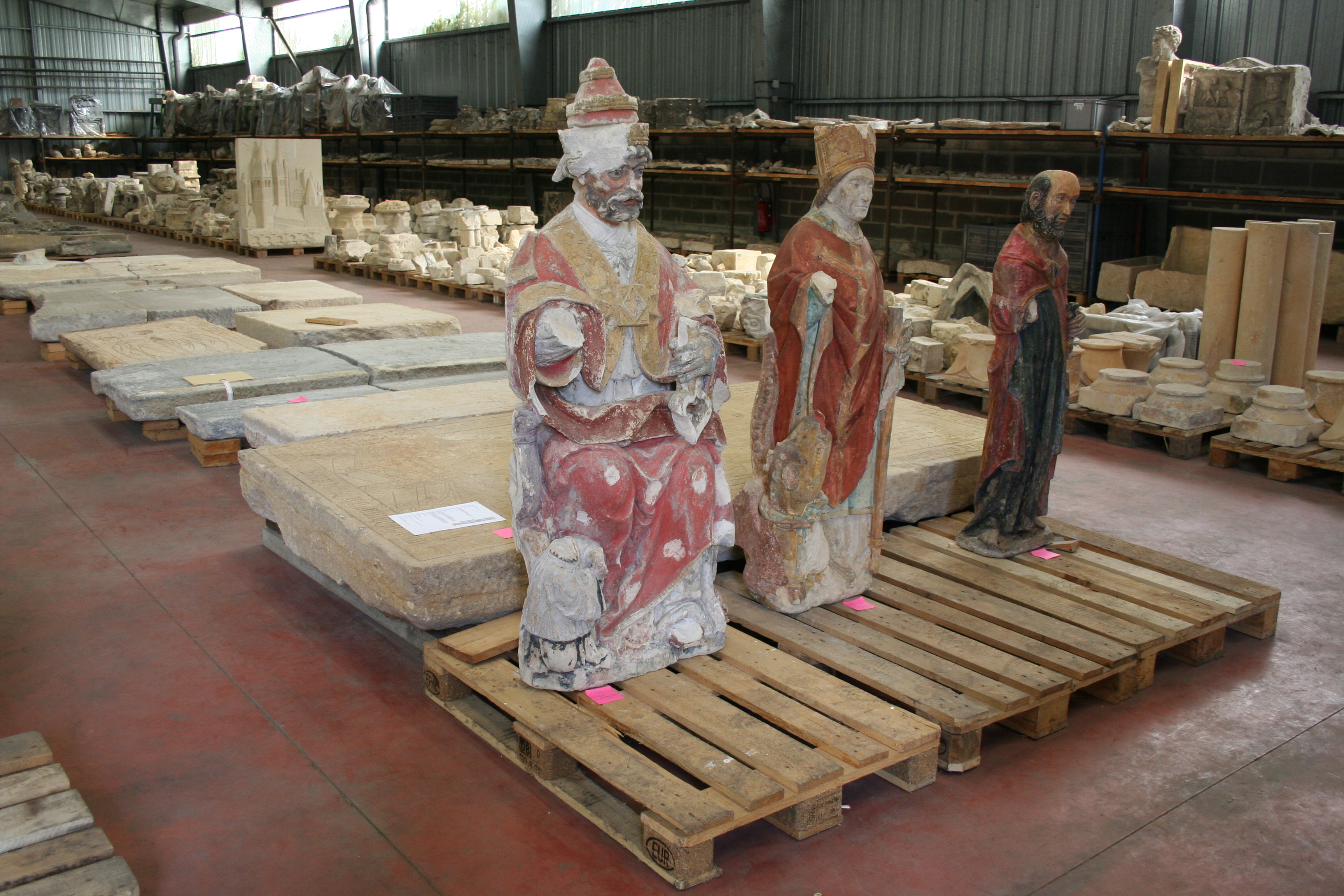 une réserve du musée de Normandie